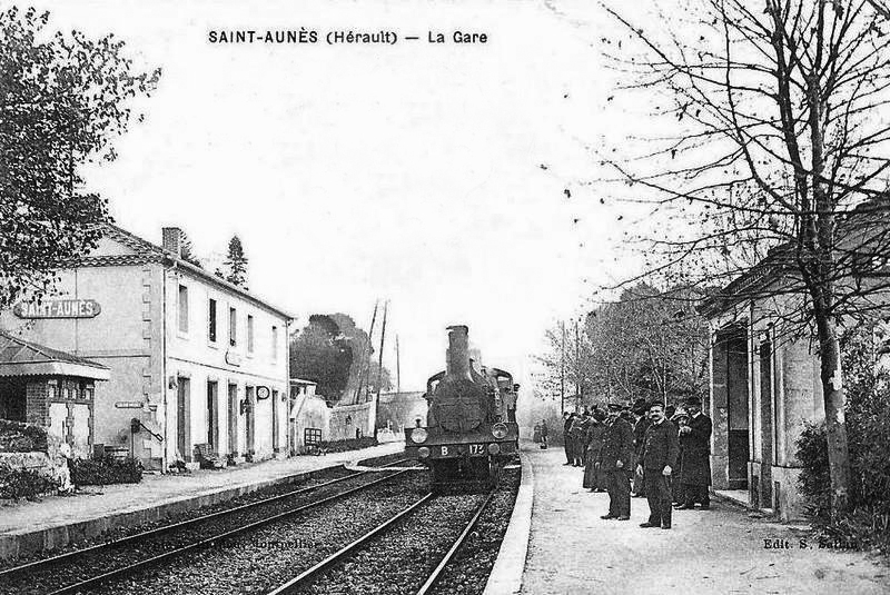 La gare voyageurs de Saint-Aunès vers 1900.